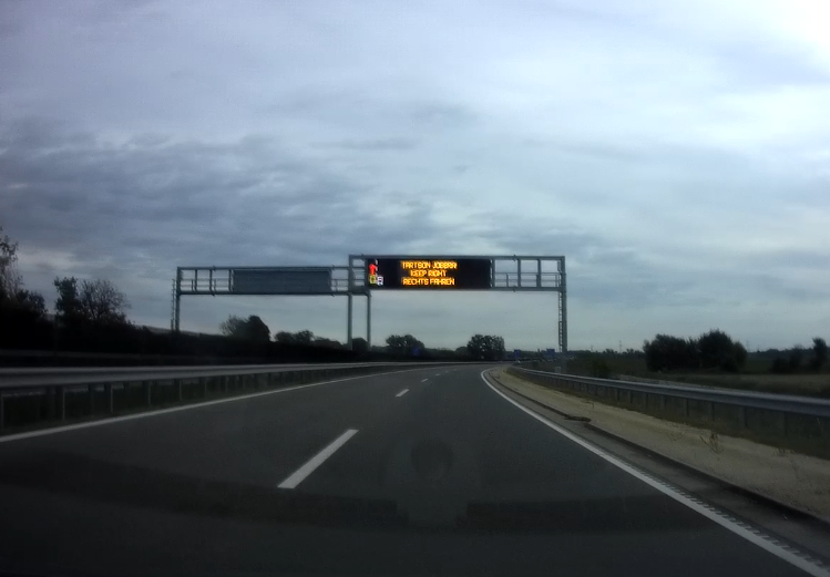 M85-ös vége Győr csomópontnál